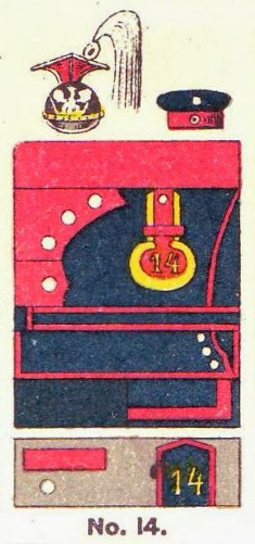 Schematische Farbdarstellung der Uniform des 2. Hannoverschen Ulanen-Regiments Nr. 14